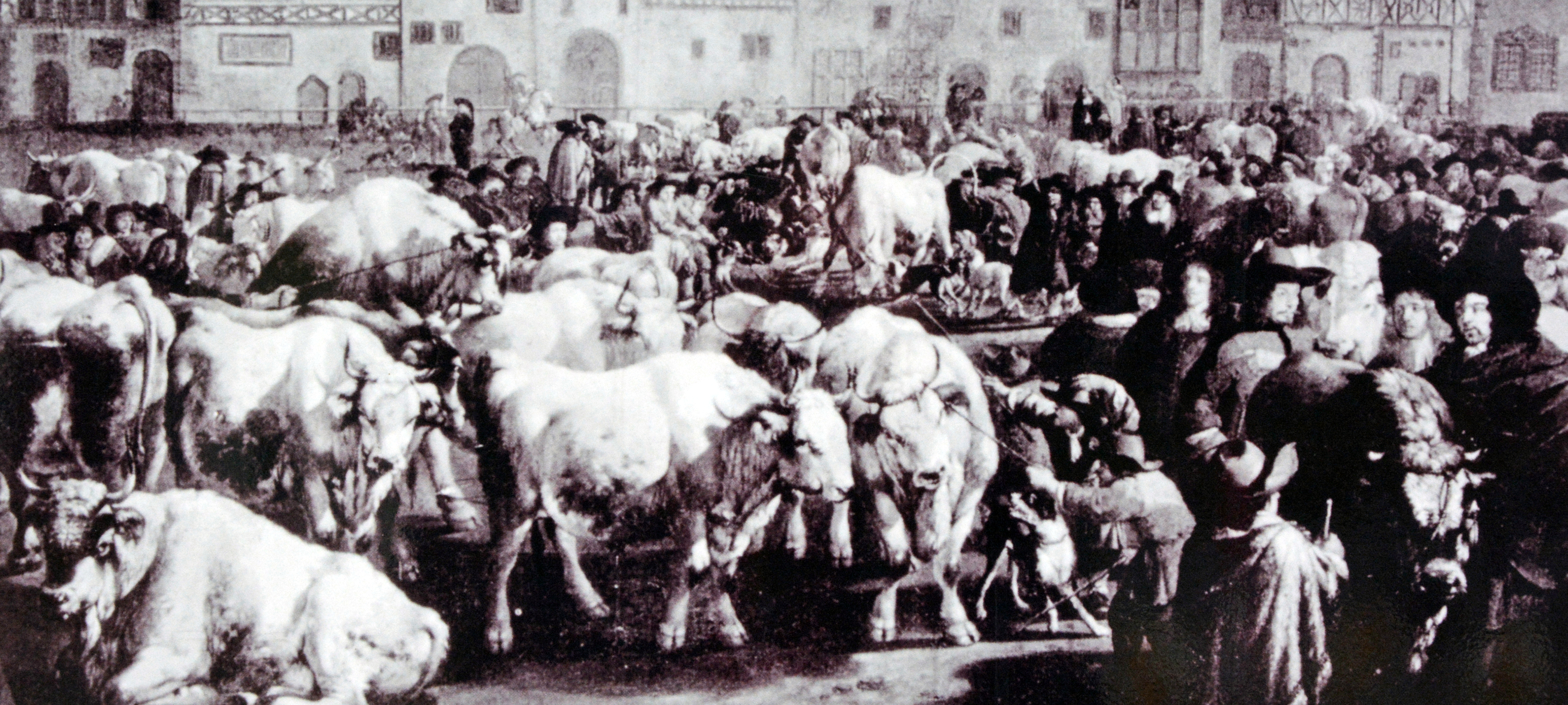 Historische Darstellung des Ochsenmarkts um 1750.